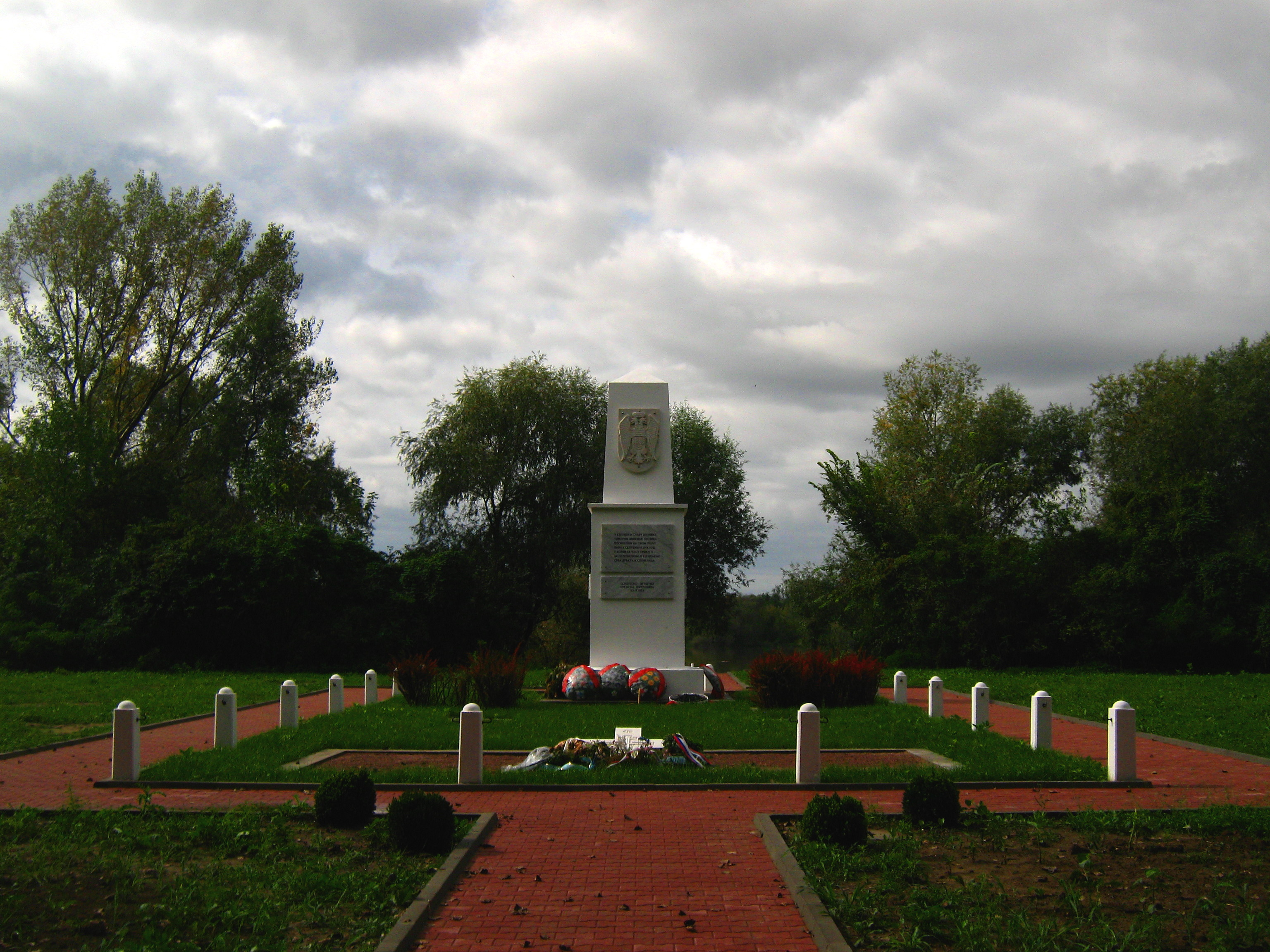 Ово је фотографија заштићеног природног добра у Србији под шифром: МПС03This is a a photo of a natural area in Serbia with ID: МПС03 Споменик погинулим српским војницима у Првом светеком рату, на пољу Легет, покрај Сремске Митровице.